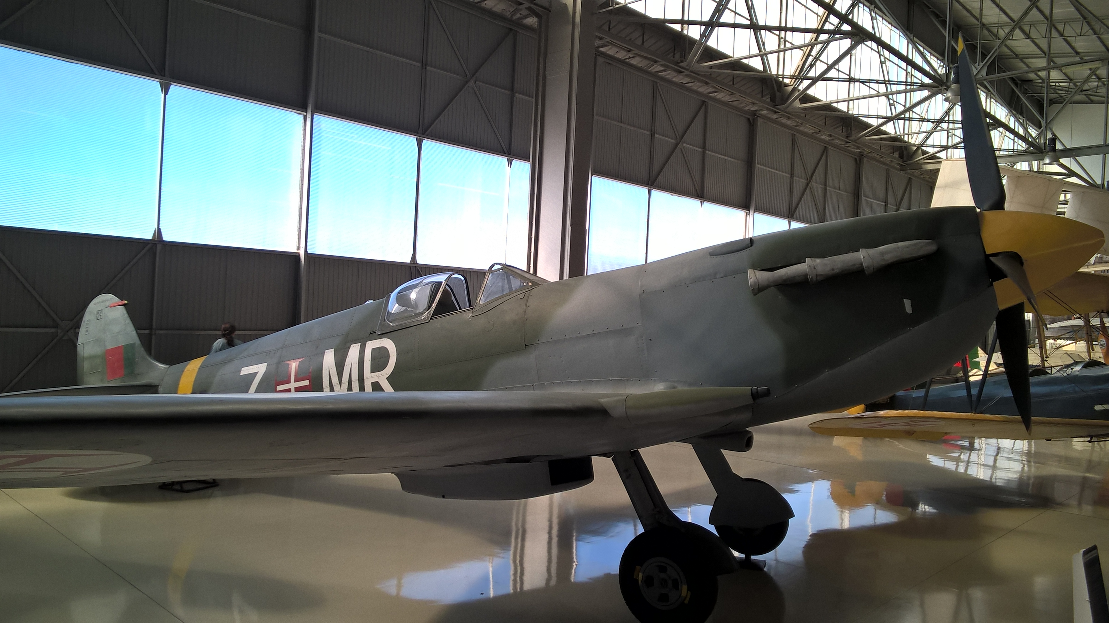 Supermarine Spitfire no Museu do Ar